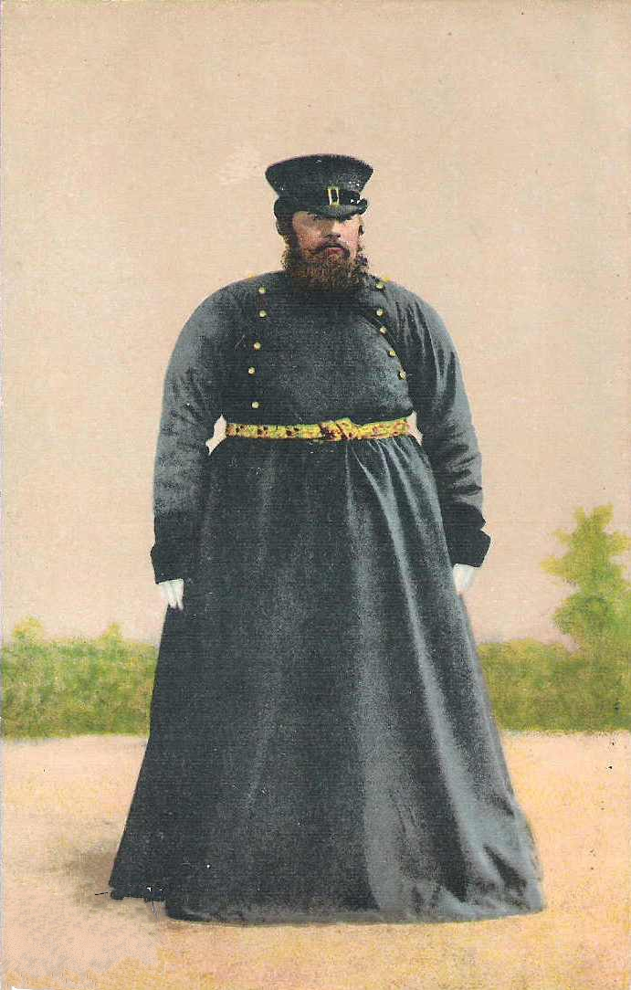 Кучер. Дореволюционная Россия.